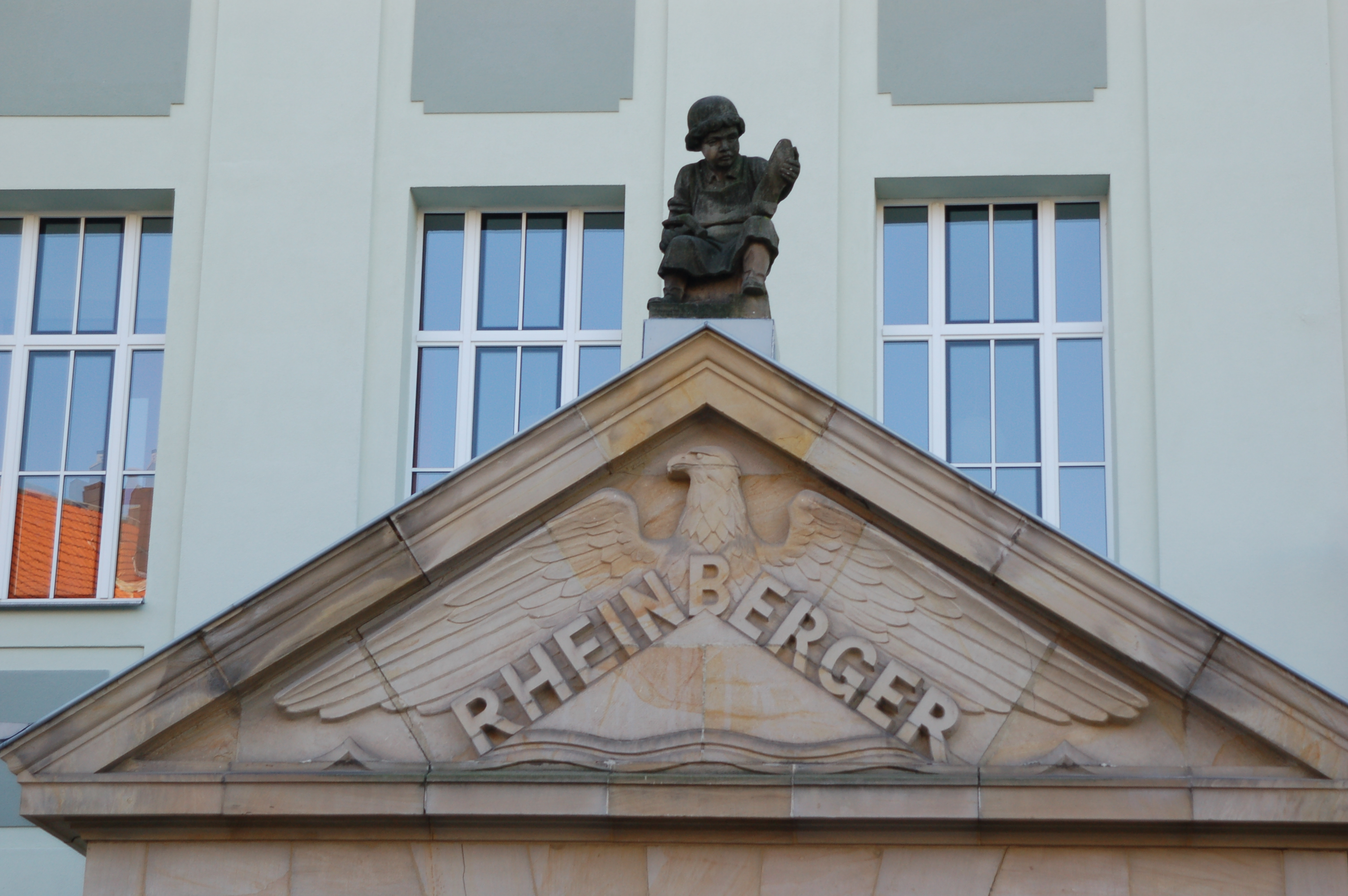 Eingangsdach des Rheinberger-Gebäudes